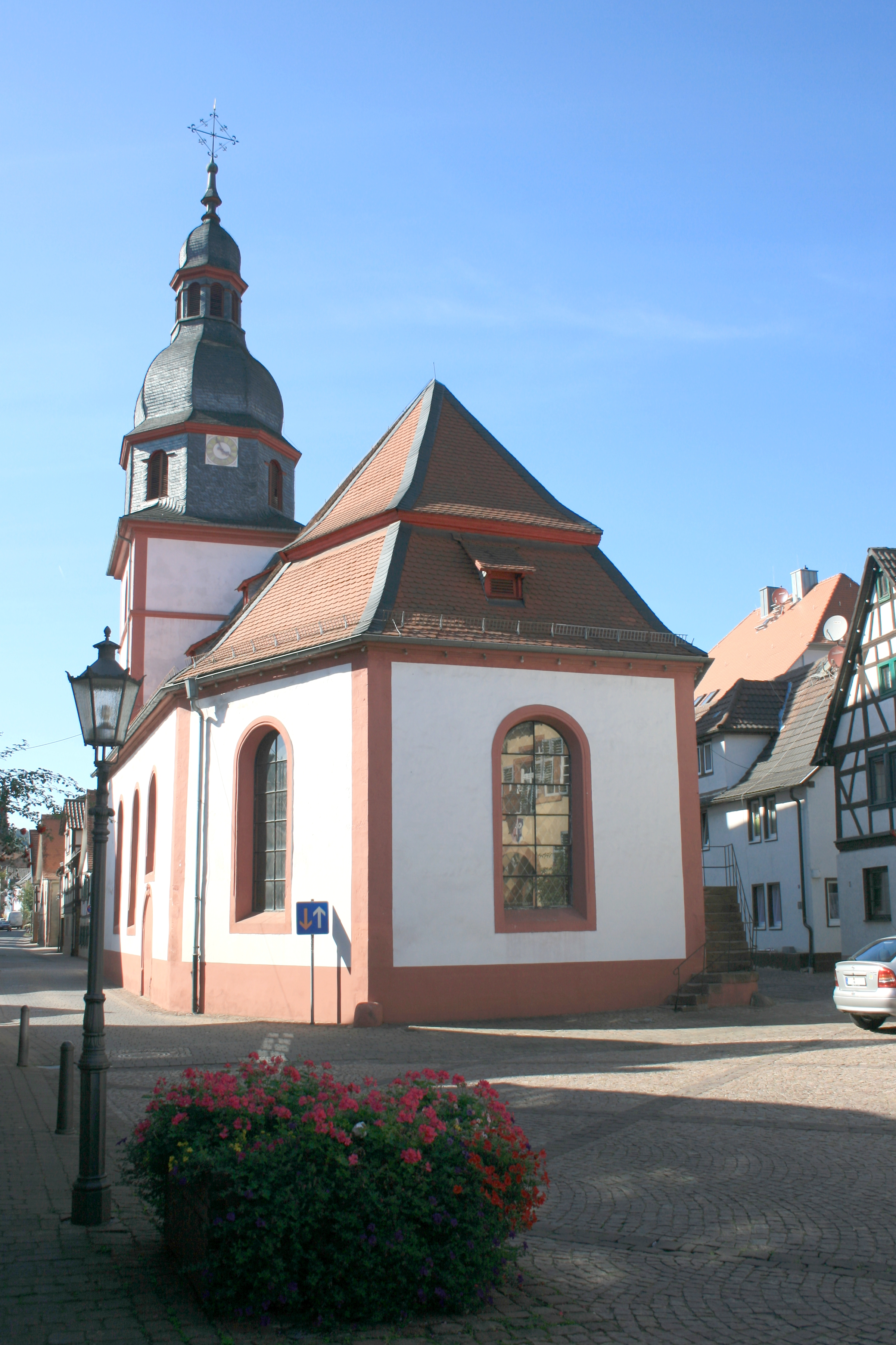 Evangelische Pfarrkirche in Breuberg-Neustadt Erbacher Straße 1, Ansicht von Osten.